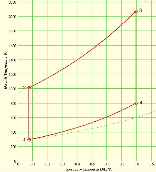 Dieselprozess im T-s-Diagramm